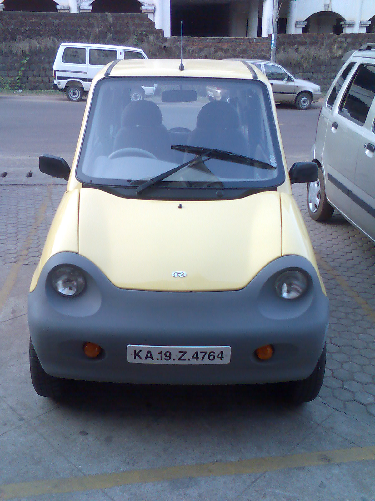 Reva Electric Car